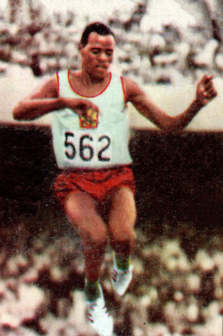 CAMPIONI DELLO SPORT 1969/70 Figurina-Sticker n. 52 -AMOS BIWOTT- KEN -Rec